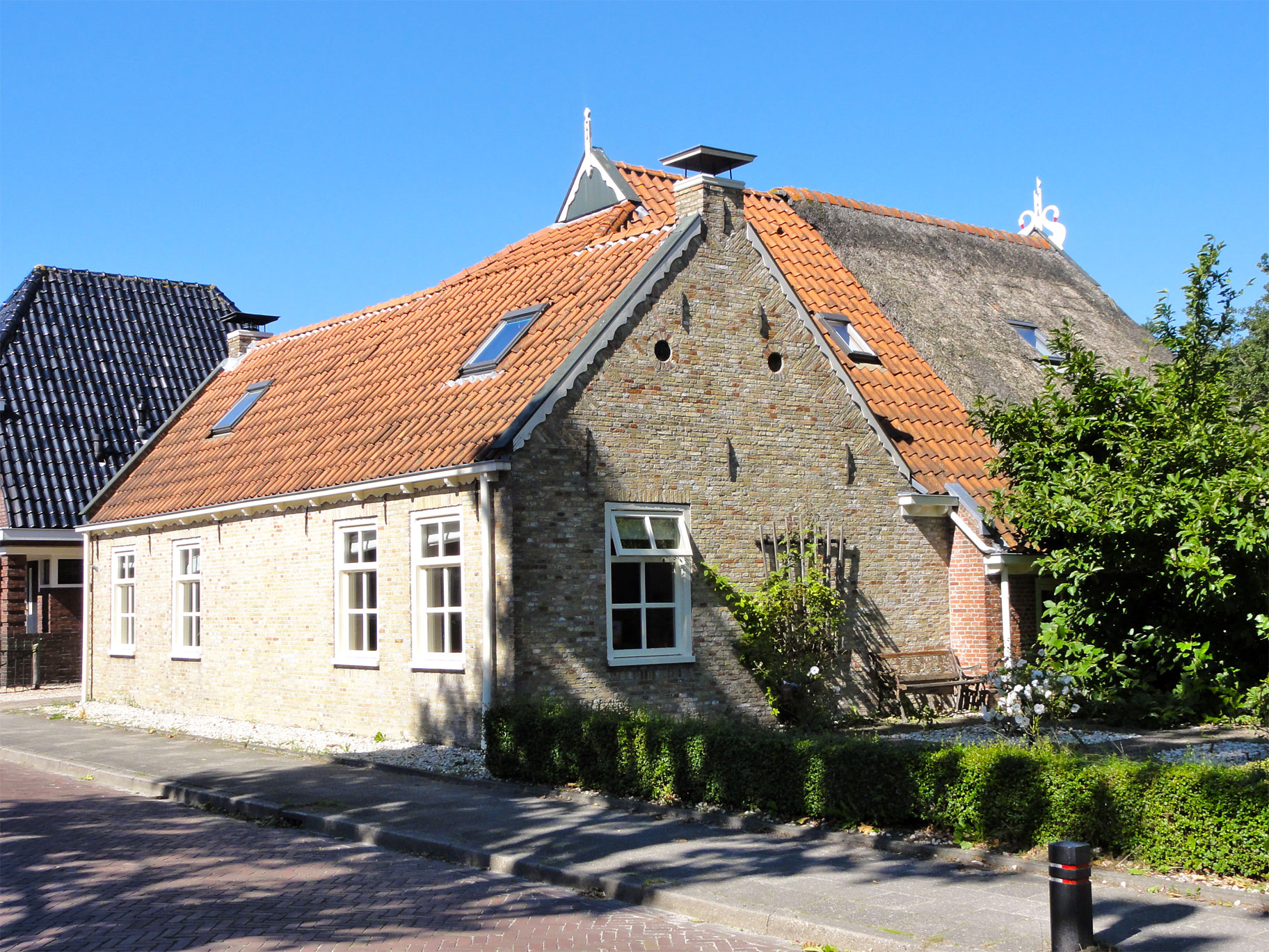 Woonhuis Schoolstraat 6 Jistrum